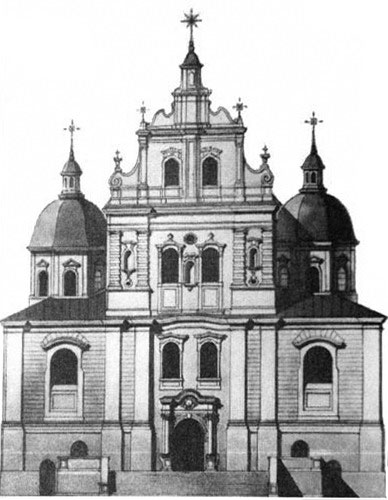 Беларуская (тарашкевіца): Менск (Miensk), вуліца Дамініканская (vulica Daminikanskaja). Касьцёл Сьвятога Тамаша Аквінскага і кляштар дамініканаў